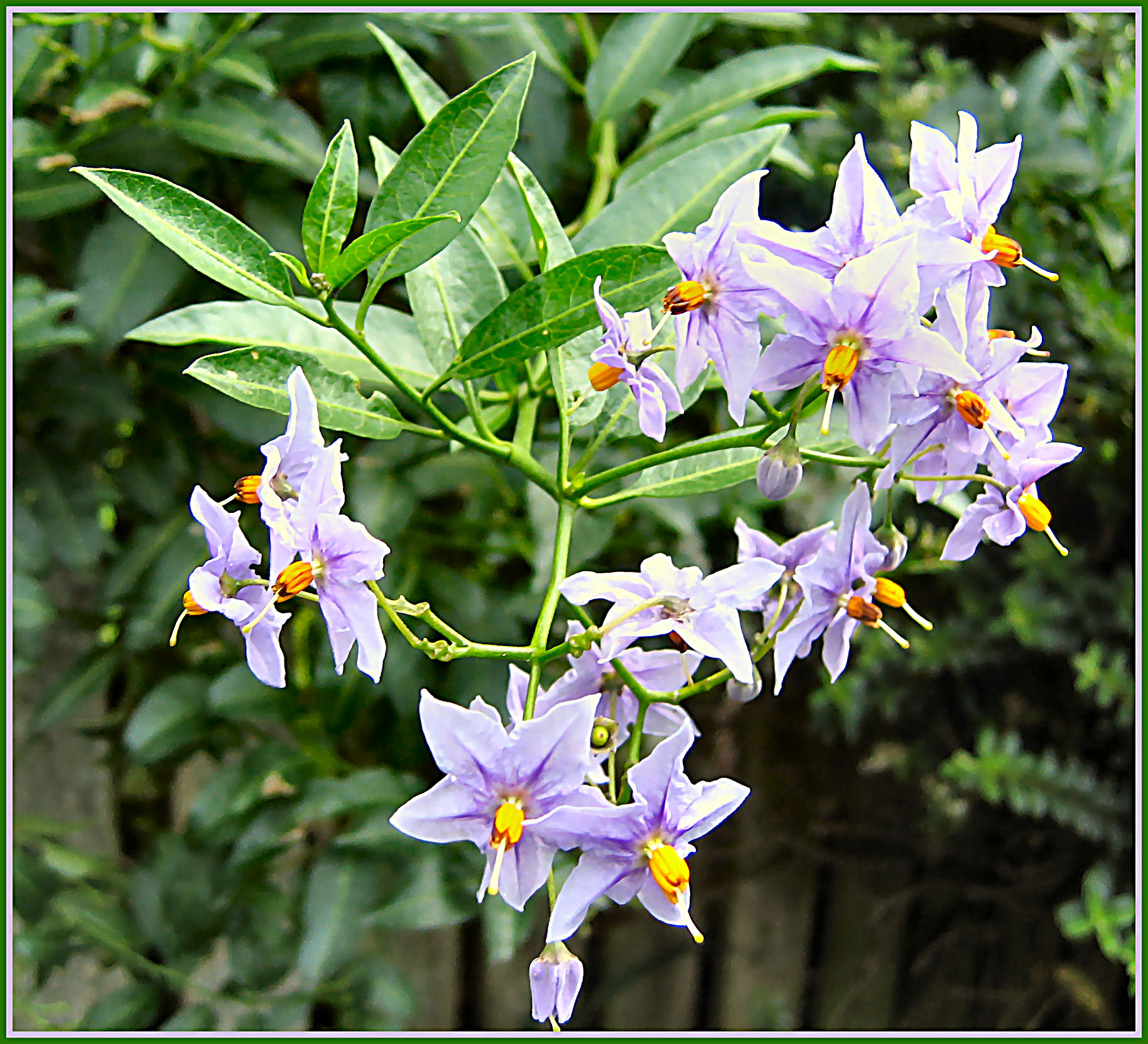 LOCAL VIEWS 059